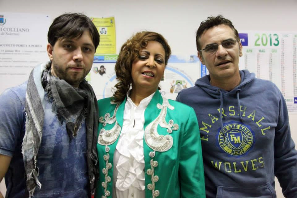 MELODIE DAL BORGO